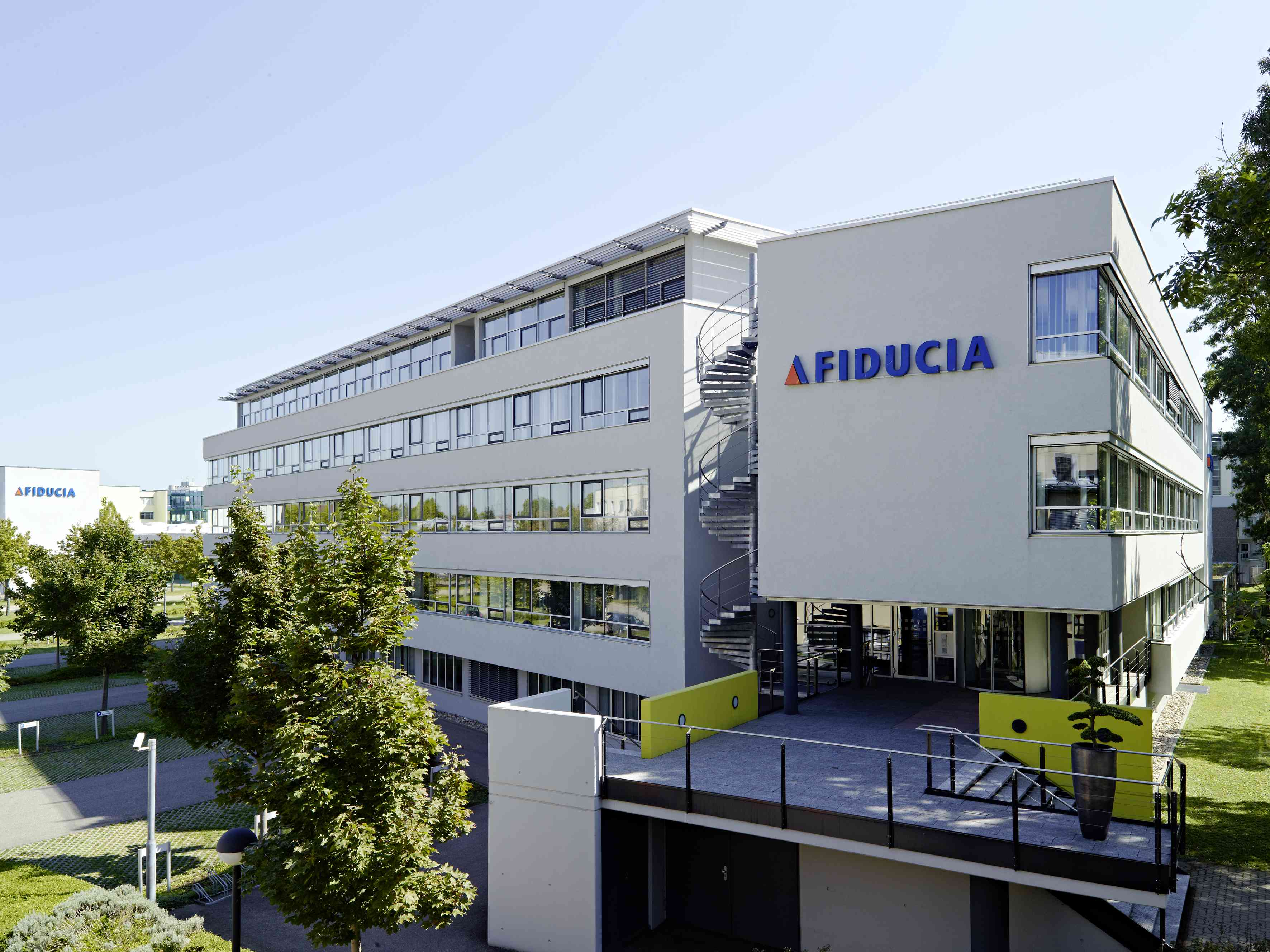 Hauptgebäude der